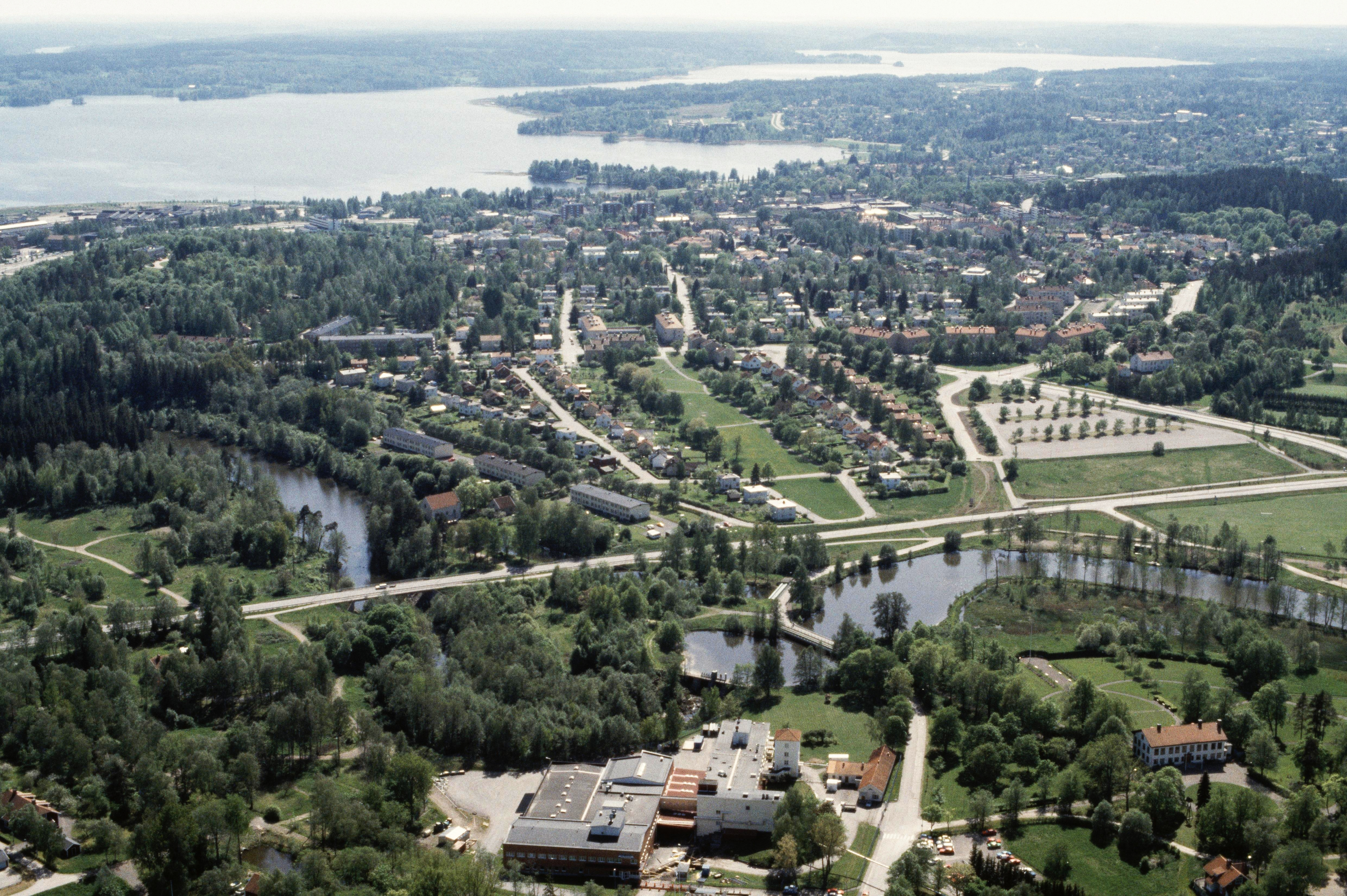 Från Björkborn mot Karls-Åby. (Även riksintresse KT29.) Motiv: Karlskoga, stadsdelen Bofors-Björkborn Nyckelord: Flygbilder, Riksintressen Kategori: Miljöer, Tätort Från Björkborn mot Karls-Åby. (Även riksintresse KT29.).